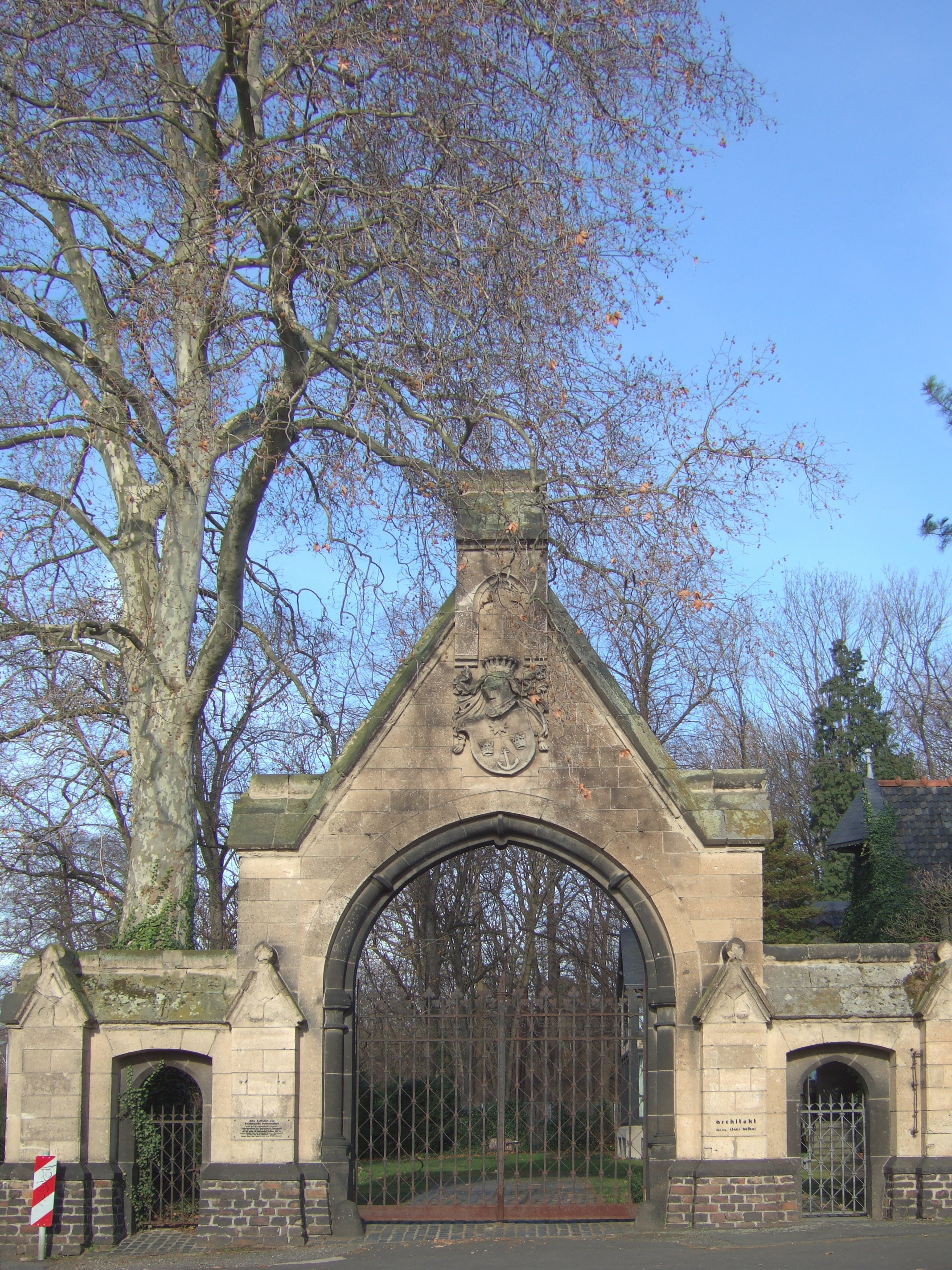 Kommende Ramersdorf, ehemalige Parkeinfahrt